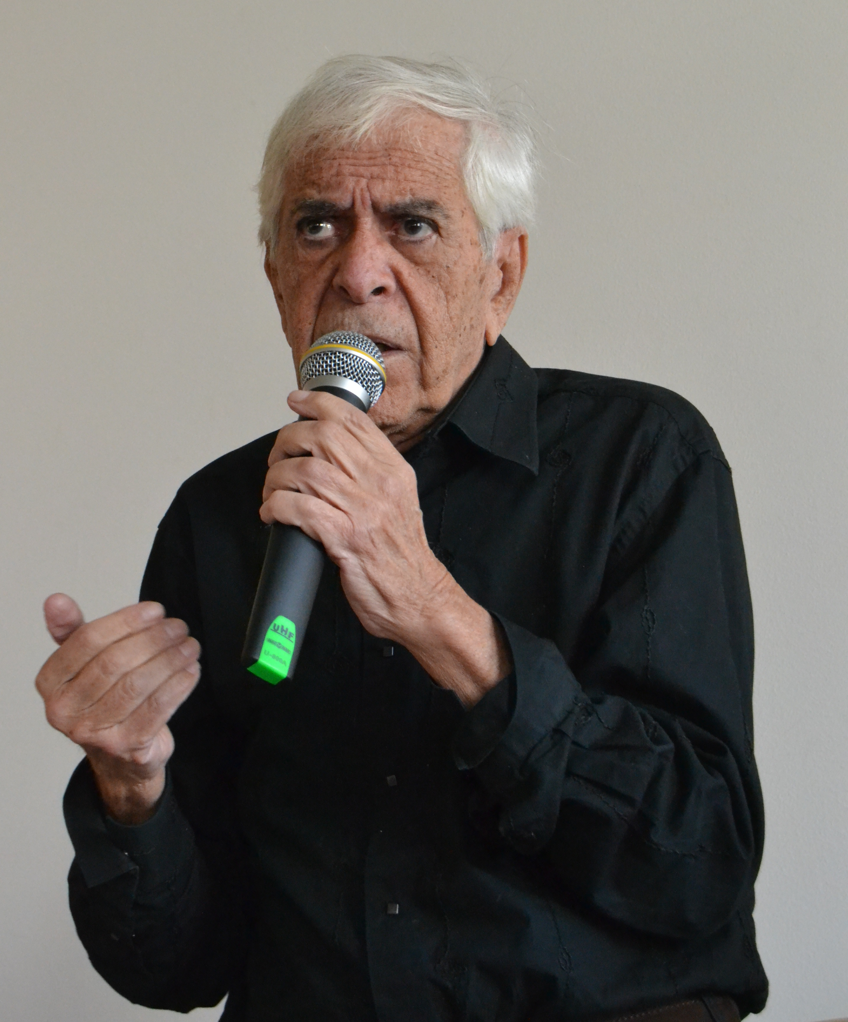 Eduardo Manet en el instituto E. Belin de Vesoul